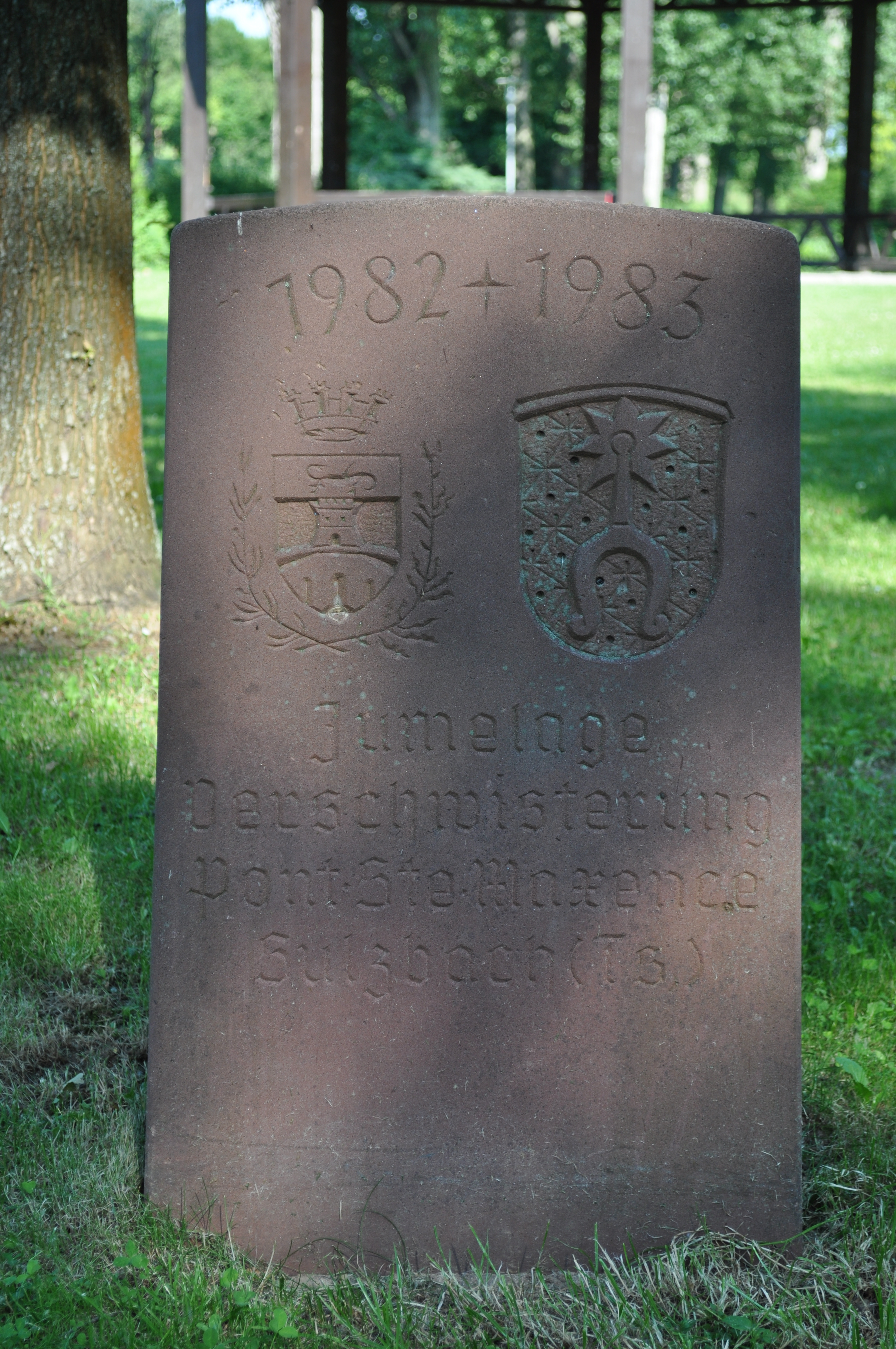 Gedenkstein für die Städtepartnerschaft zwischen Sulzbach und Pont-Sainte-Maxence 1982 in Sulzbach